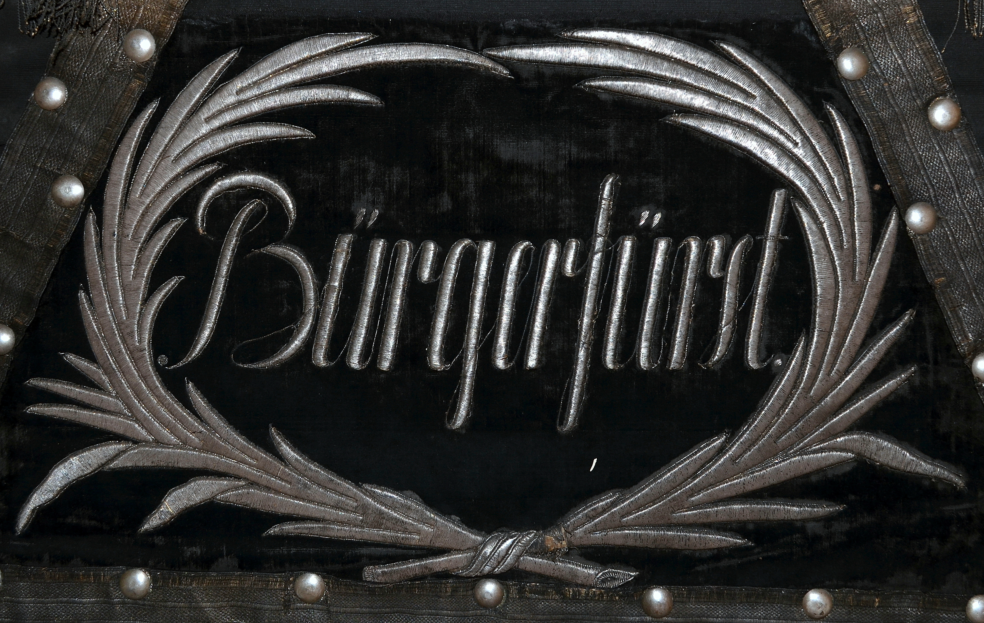 Braunschweiger Dom, Krypta: Restaurierter Sarg des „Schwarzen Herzogs“, Friedrich Wilhelm von Braunschweig-Lüneburg-Oels. Stickerei am Kopfende: „Bürgerfürst“.